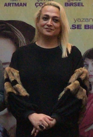 Ayta Sözeri, Aile Arasında filminin İzmir galasında.